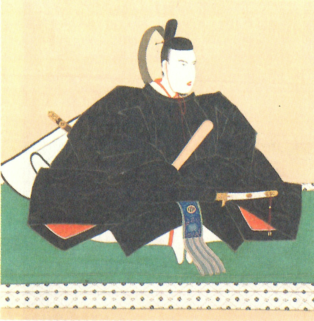 伊達斉宗の肖像。